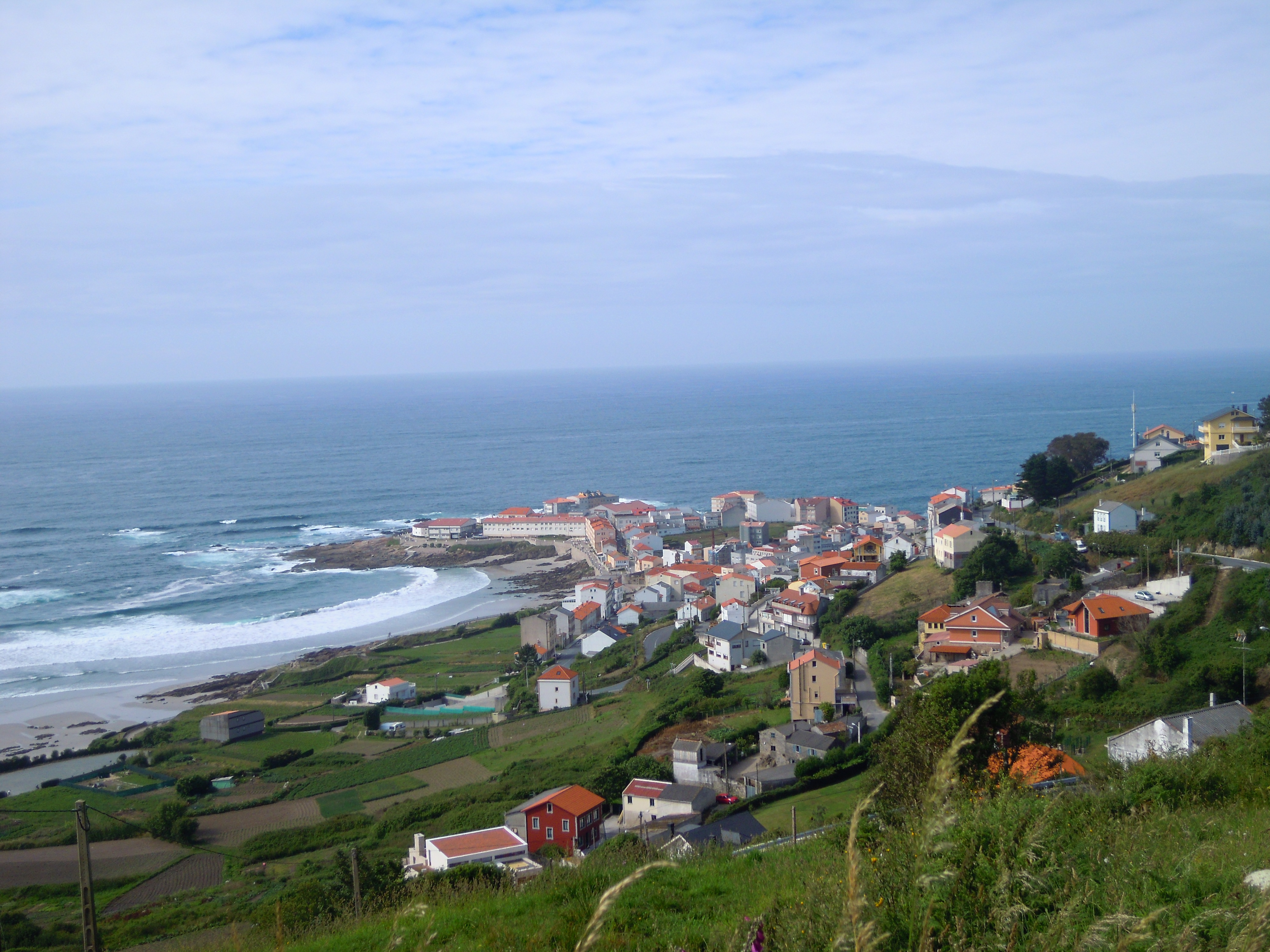 Vista de Caión, A Laracha, Galiza.